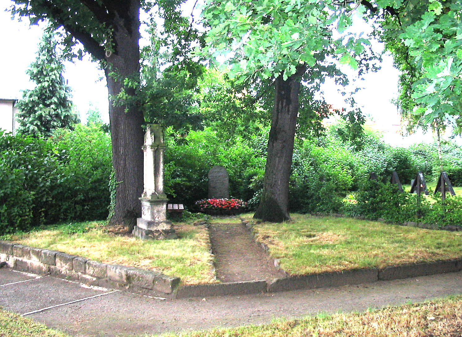 Radebeul, Alter Friedhof (Kötzschenbroda), WKII-Mahnmal